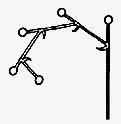 vrcholičnaté květenství